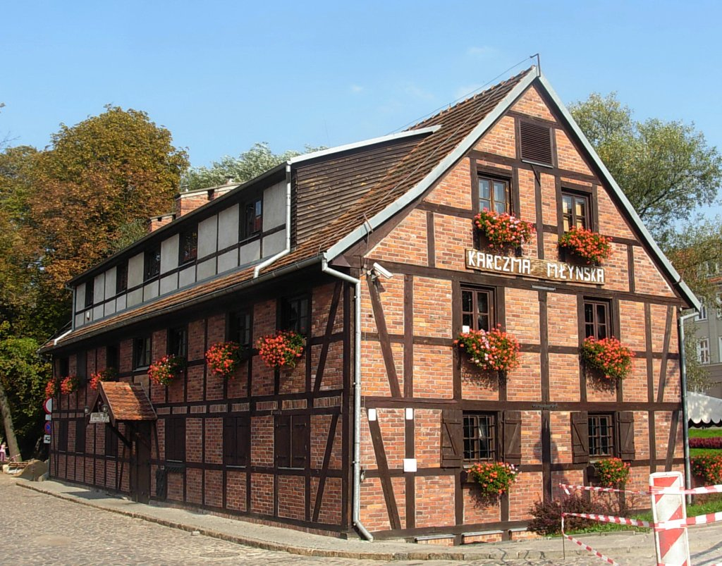 Karczma Młyńska w Bydgoszczy